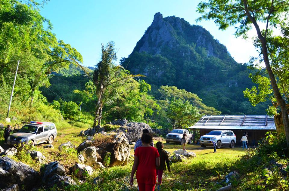 Tersa – Feria , 23 Juñu 2015. S. E. Primeira-Dama, Isabel da Costa Ferreira no Oan sira, antes atu fila mai Dili, Sei liu husi Knua Kaiwalita, Baguia, hodi Vizita fila fali Aman Mate-bian Sr. Antonio de Vasconcelos nia rate. Mate-Bian husik hela nia Oan, Subriño, Subriña, no Beioan sira iha Loron, 19 Juñu 1997.